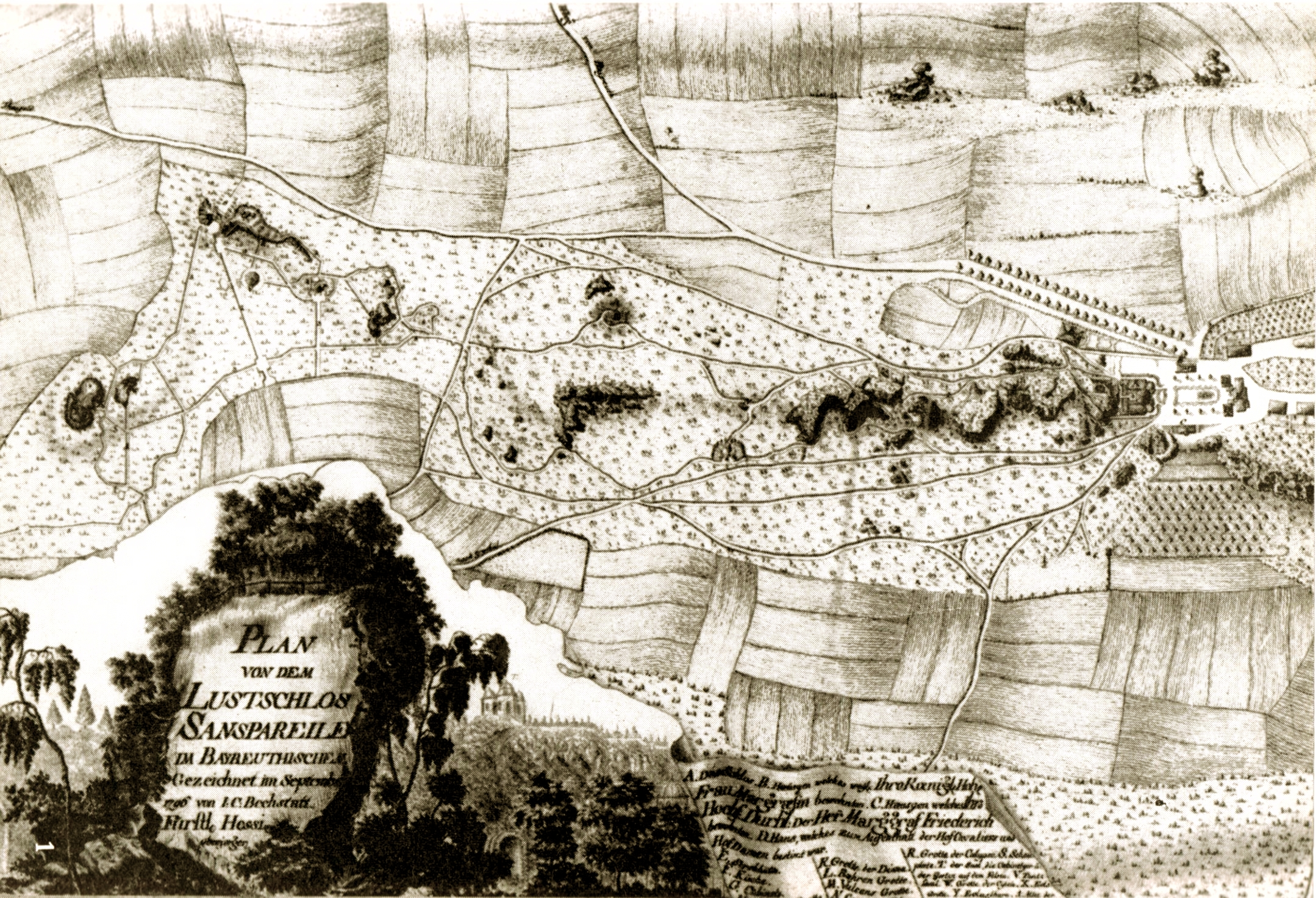 Historischer Plan des Felsengartens Sanspareil (Gemeinde Wonsees, Franken, Bayern) von J.C. Bechstatt aus dem Jahr 1796